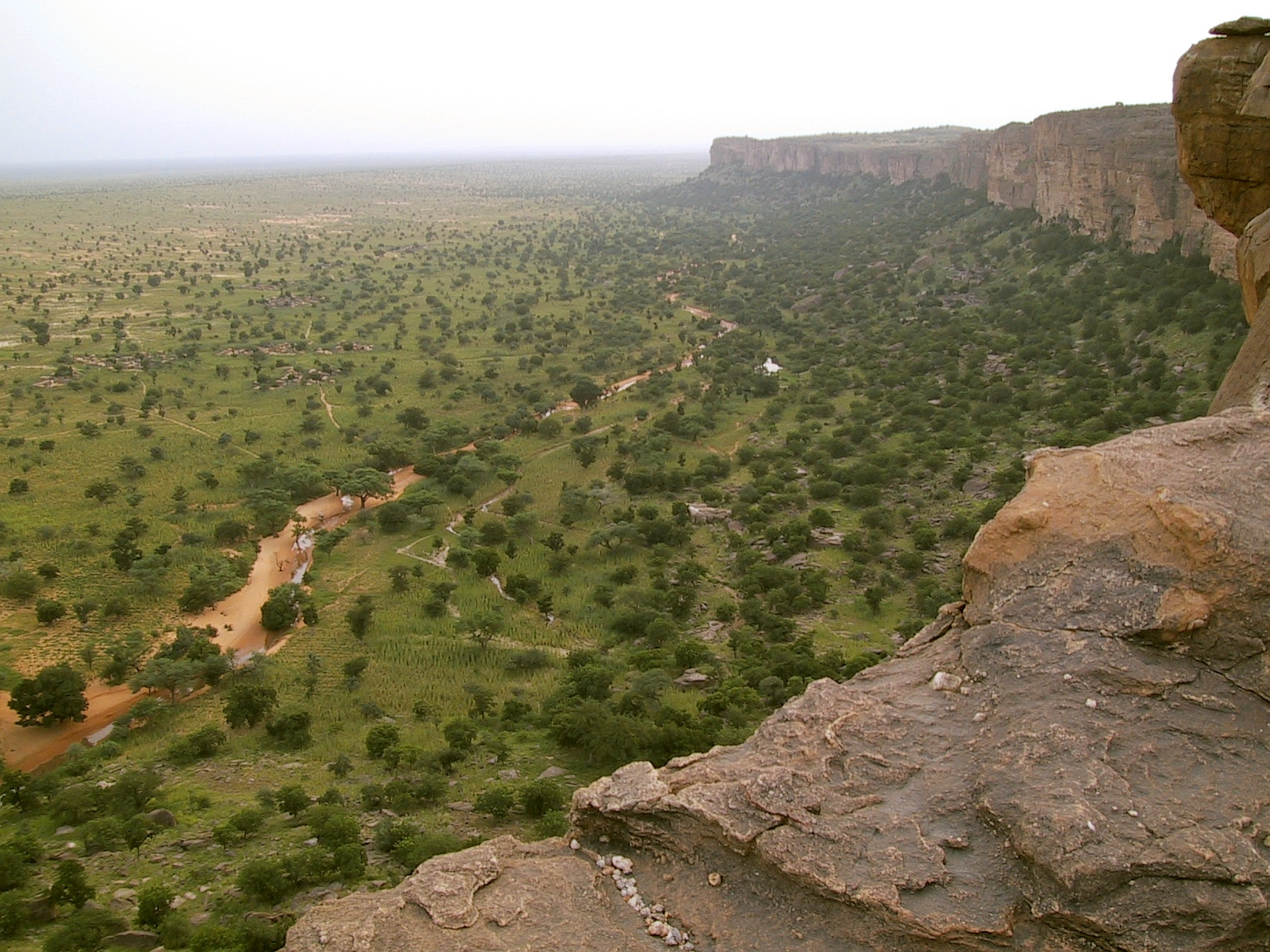 Les Falaises de Bandiagara, das Bandiagara Felsmassiv, Bandiagara Escarpment — & Sahel. Blick von Kani-Kombole in Richtung Süden